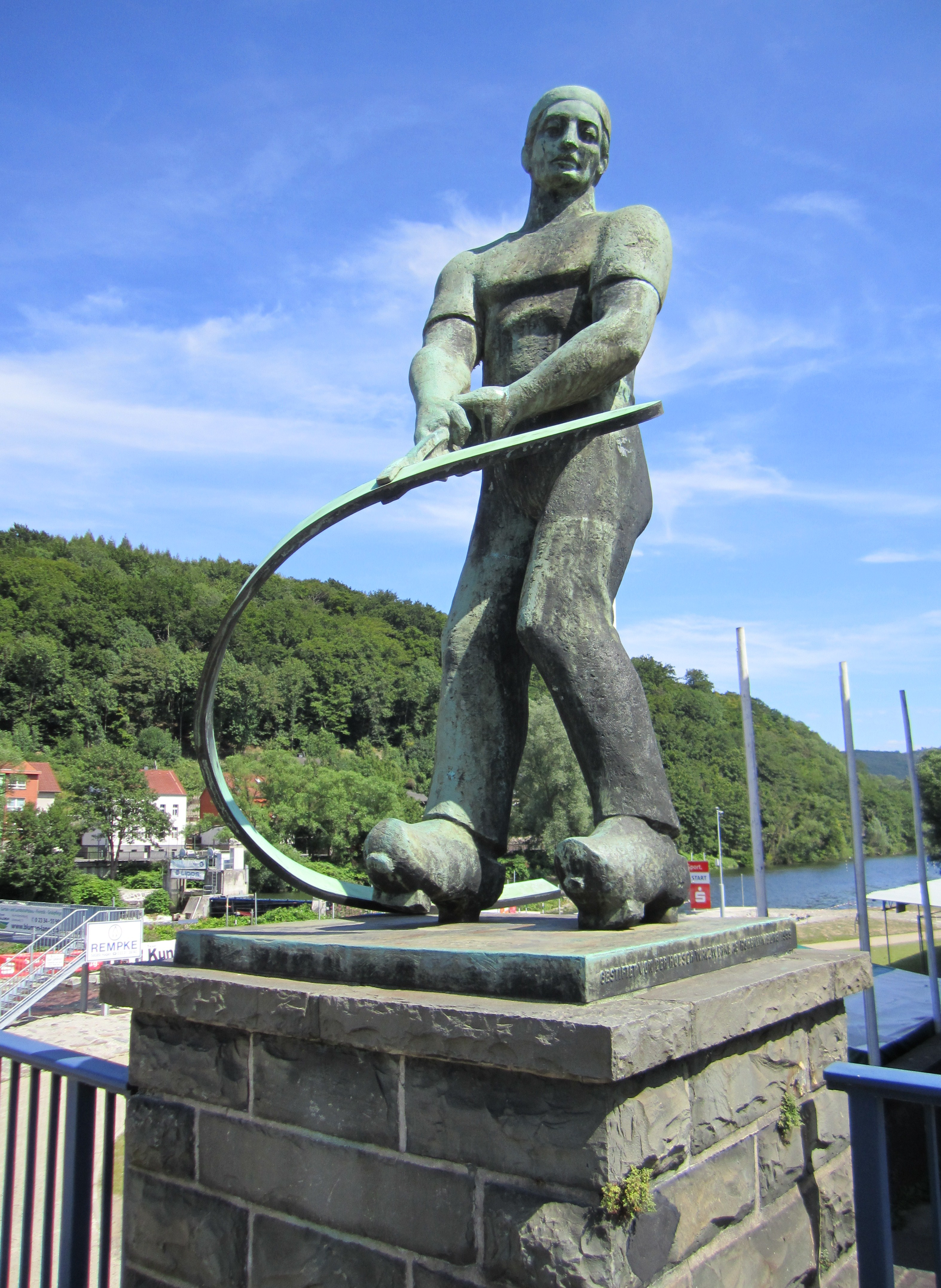 Warmwalzer-Denkmal im Hagener Stadtteil Hohenlimburg, Stennertbrücke. Eines der Wahrzeichen von Hohenlimburg und an der neu errichteten Straßenbrücke über die Lenne am 12. Dezember 1959 enthüllt. Gestiftet von der Firma Hoesch Walzwerke AG. Entworfen und in Bronze gegossen von dem in Hohenlimburg lebenden Bildhauer Engelbert Kaps (1888−1975); sie zeigt einen Arbeiter der Stahlband schleudert - ein typischer Arbeitsschritt beim Warmwalzen. Modell für die drei Meter hohe und 700 kg schwere Skulptur war der Warmwalzer Willi Straet aus Oestrich. Gegossen wurde die Skulptur in der Kunstgießerei Gustav Schmäke, Düsseldorf. Als Gegenstück zum Warmwalzer steht der Kaltwalzer auf der anderen Seite der Stennertbrücke.